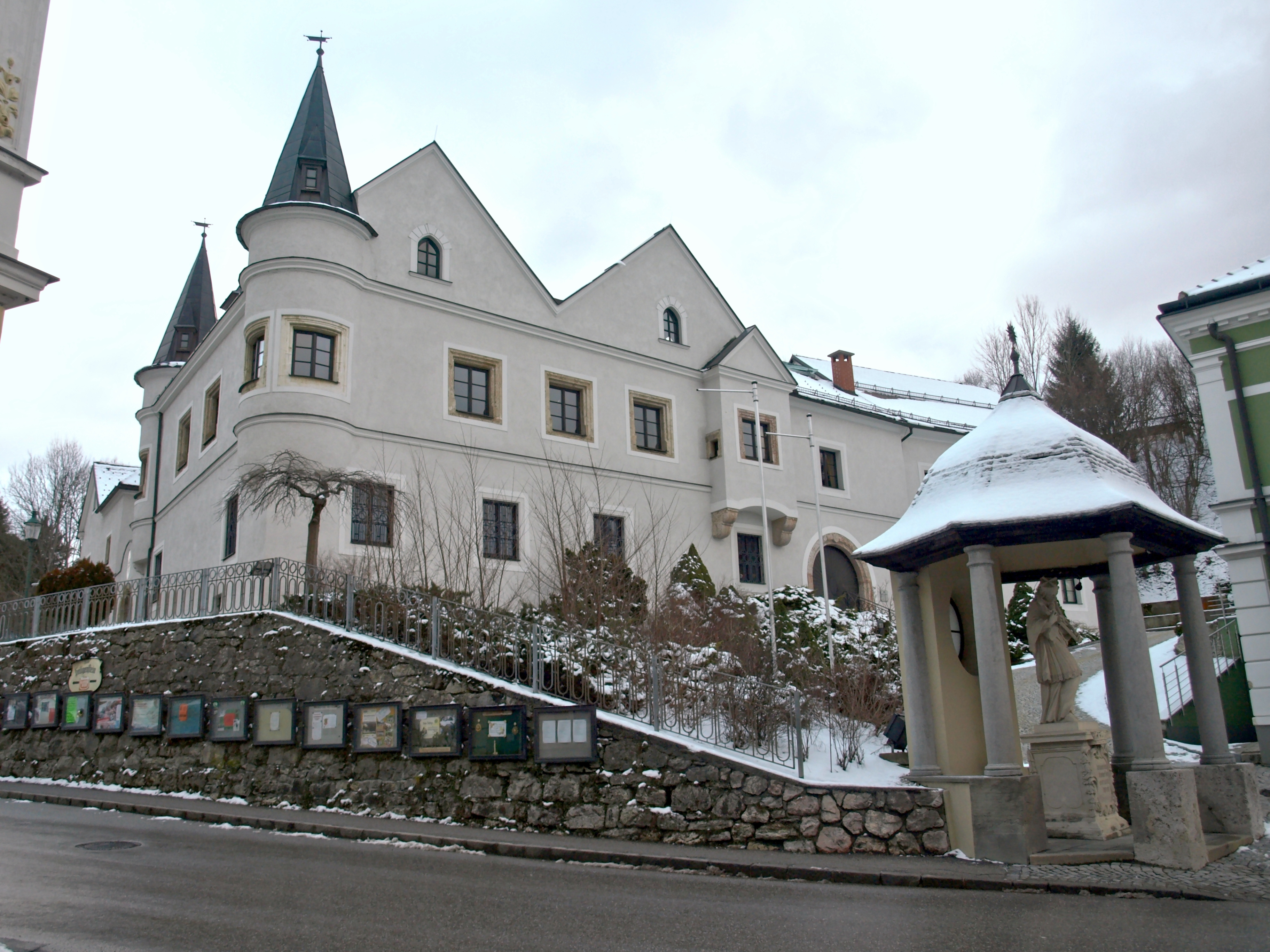 Schloss Weyer, Egerer-Schlössel